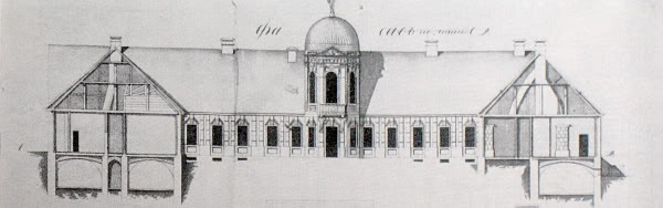 Палац Тызенгаўза